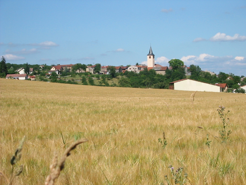 Fauconcourt Vue d'ensemble Commune du canton de Rambervillers (Vosges) Photo personnelle du 10 juillet 2006. Copyright © Christian Amet